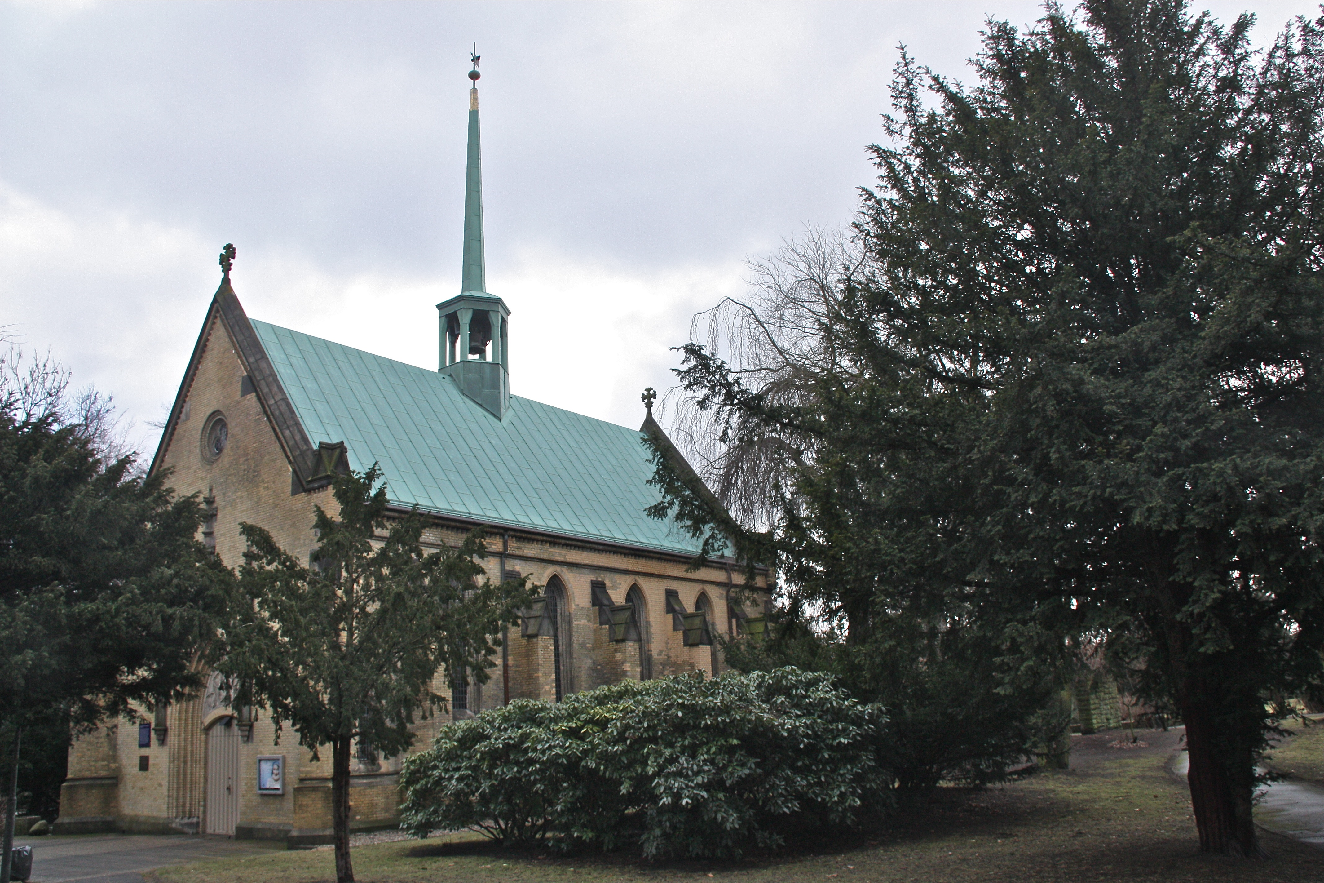 Hamburg, Eilbek, Osterkirche im Jacobipark This is a photograph of an architectural monument.